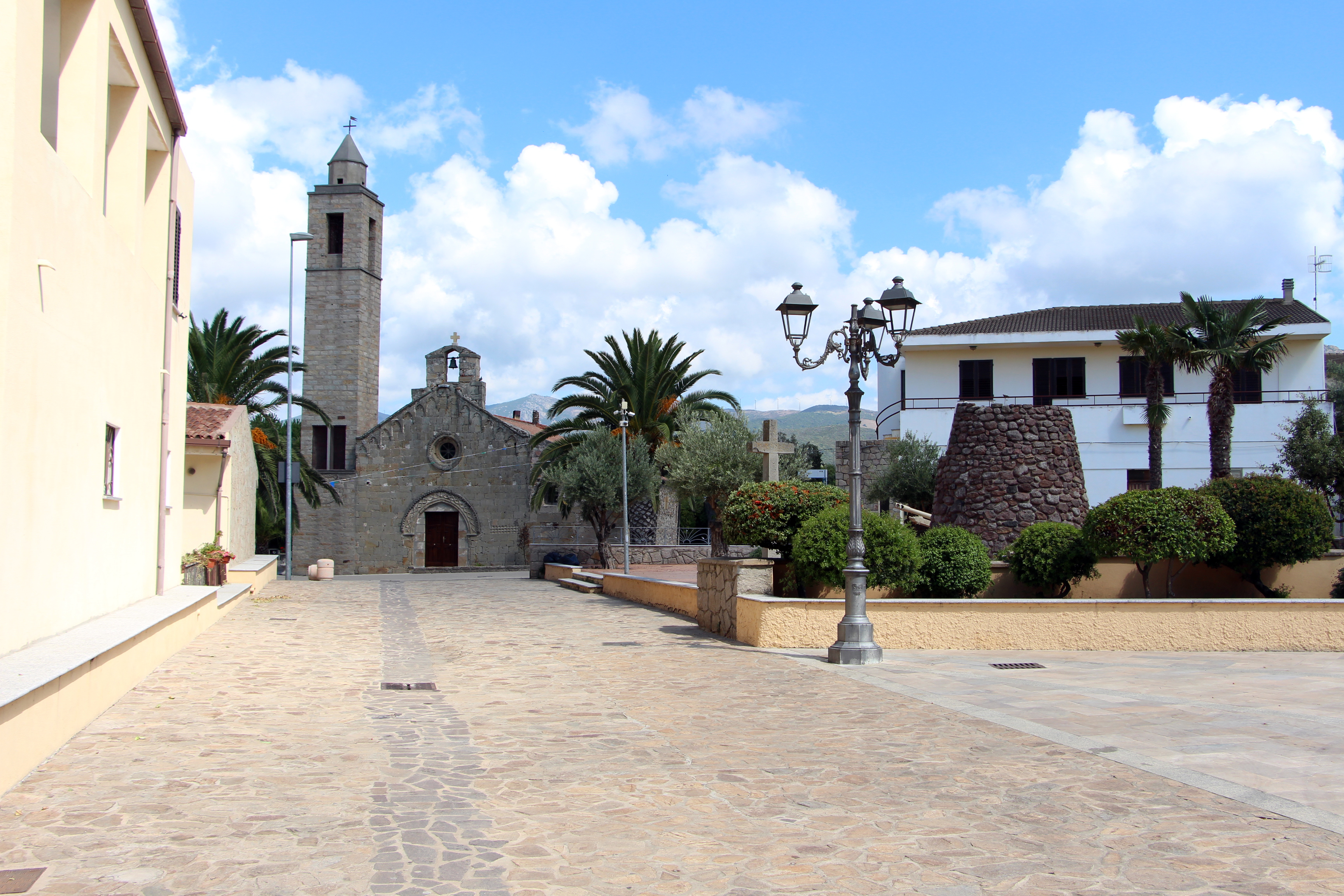 Santa Maria Coghinas